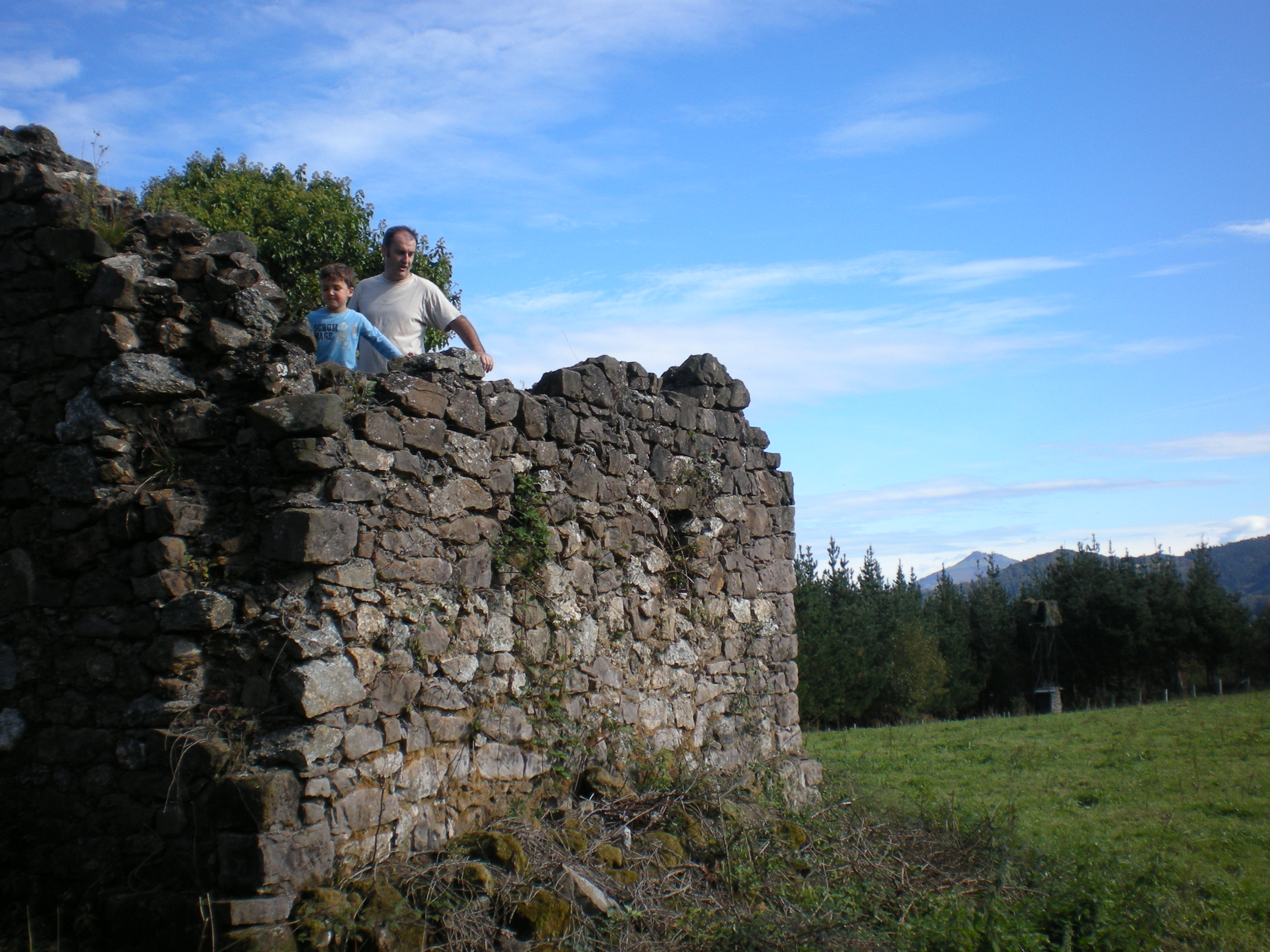 Fortress of Zubeltzu (Irun, Basque Country), republican position destroyed in the Spanish Civil War.